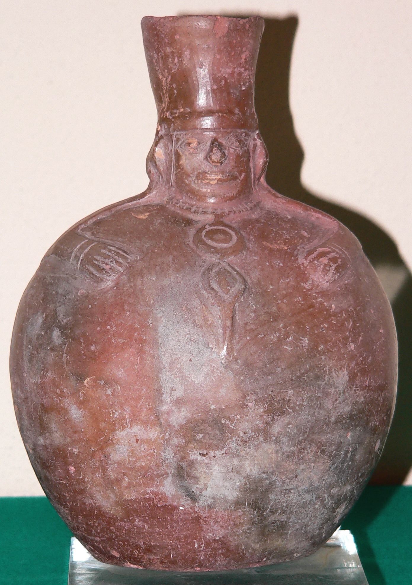 Descripción: Vasija de barro simulando una cara coronada con tocado alto. Antigüedad: Siglo VII a XI d.C Cultura: Cultura Huari País : Perú Fotógrafo: © Manuel González Olaechea y Franco Fecha de la foto : 25 de abril de 2008